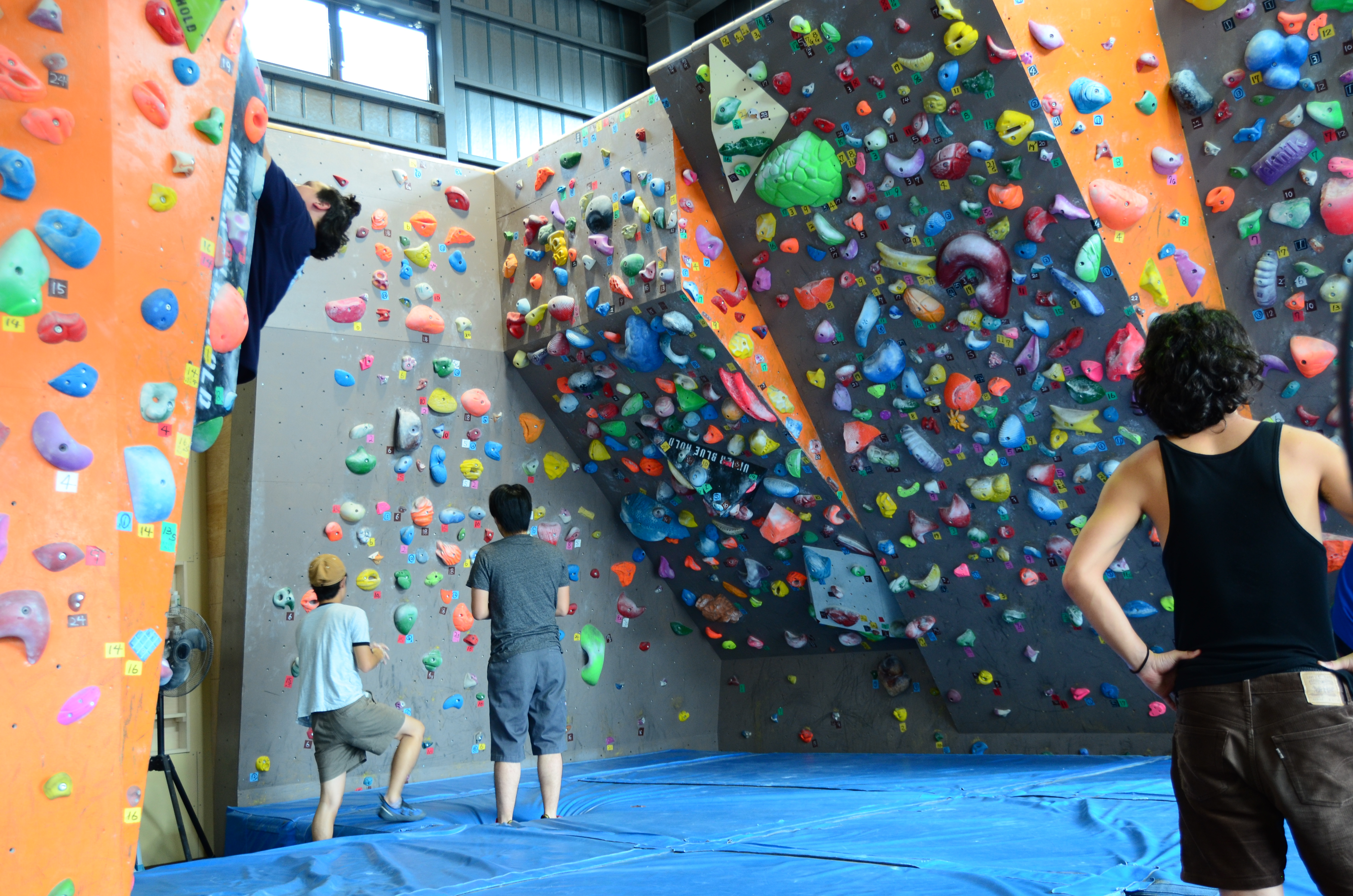 クライミングジム CoCoRock